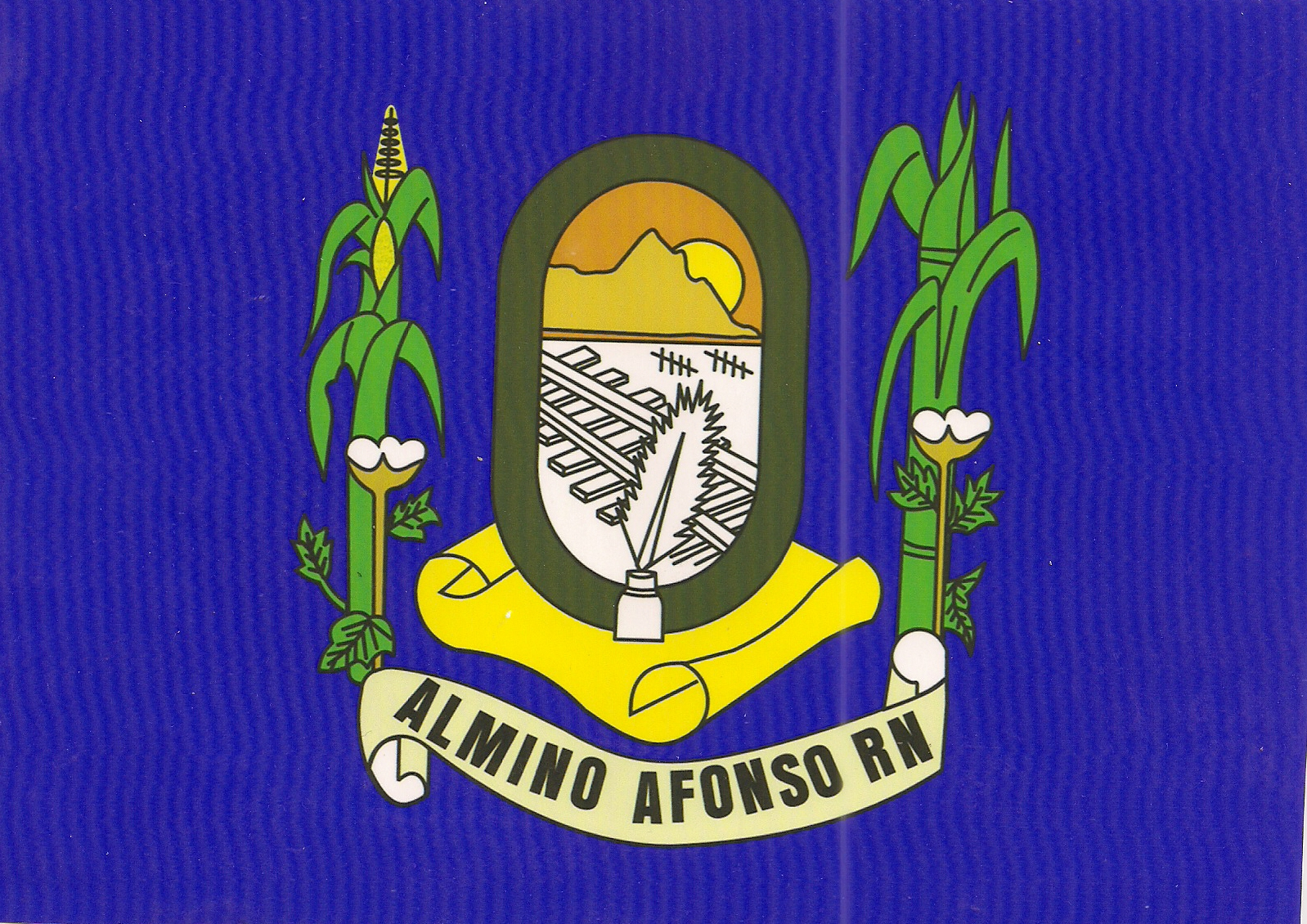 Bandeira do município de Almino Afonso (Rio Grande do Norte)